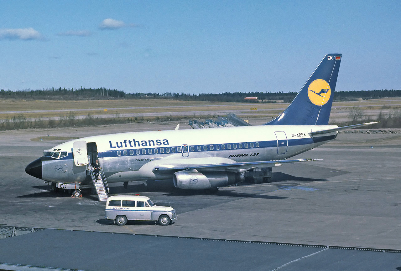 Lufthansa Boeing 737-130 D-ABEK at Stockholm-Arlanda Airport